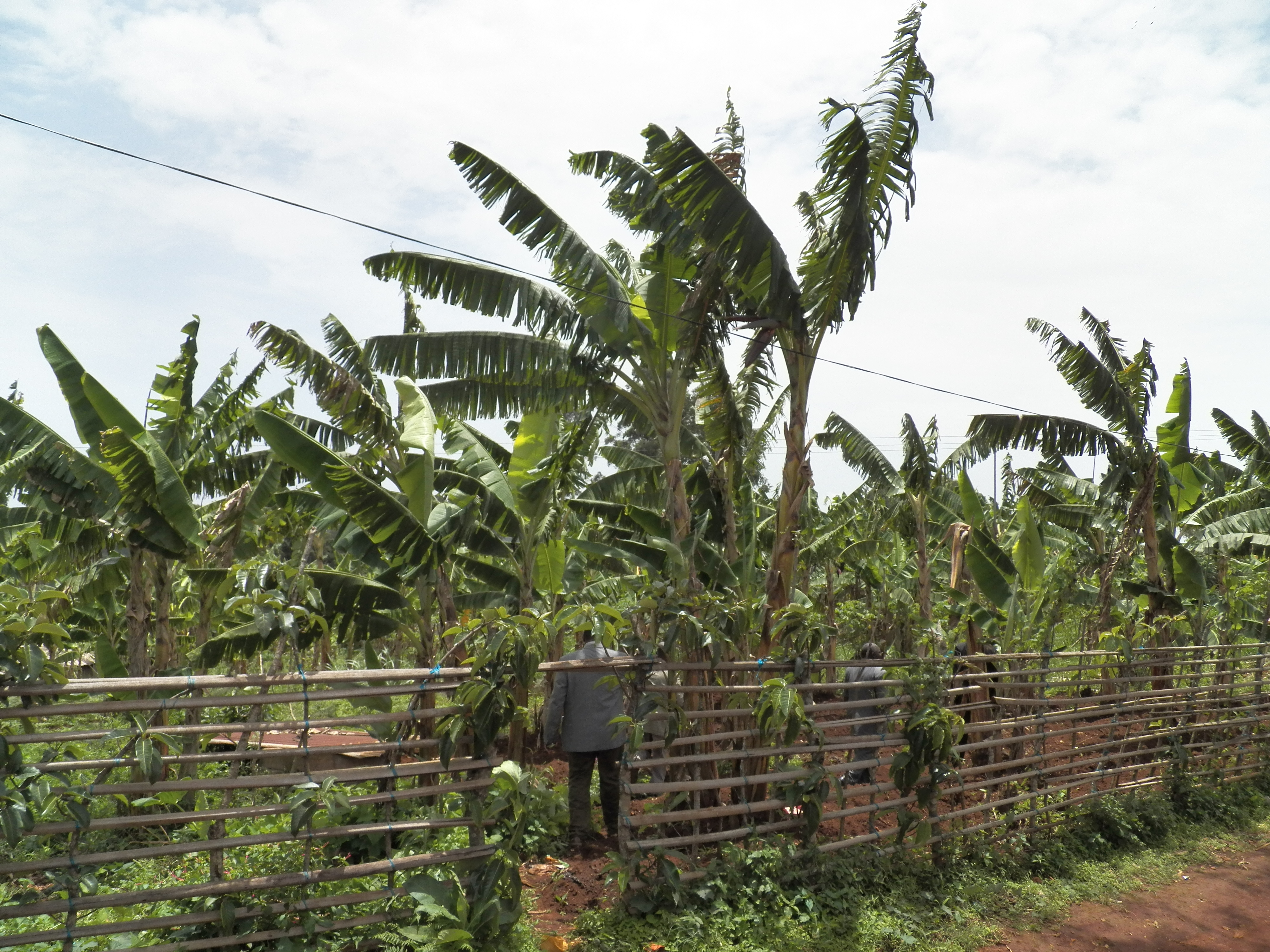 Actions des élèves de l'EP de Mbô